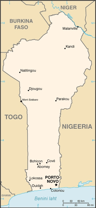 Benini kaart